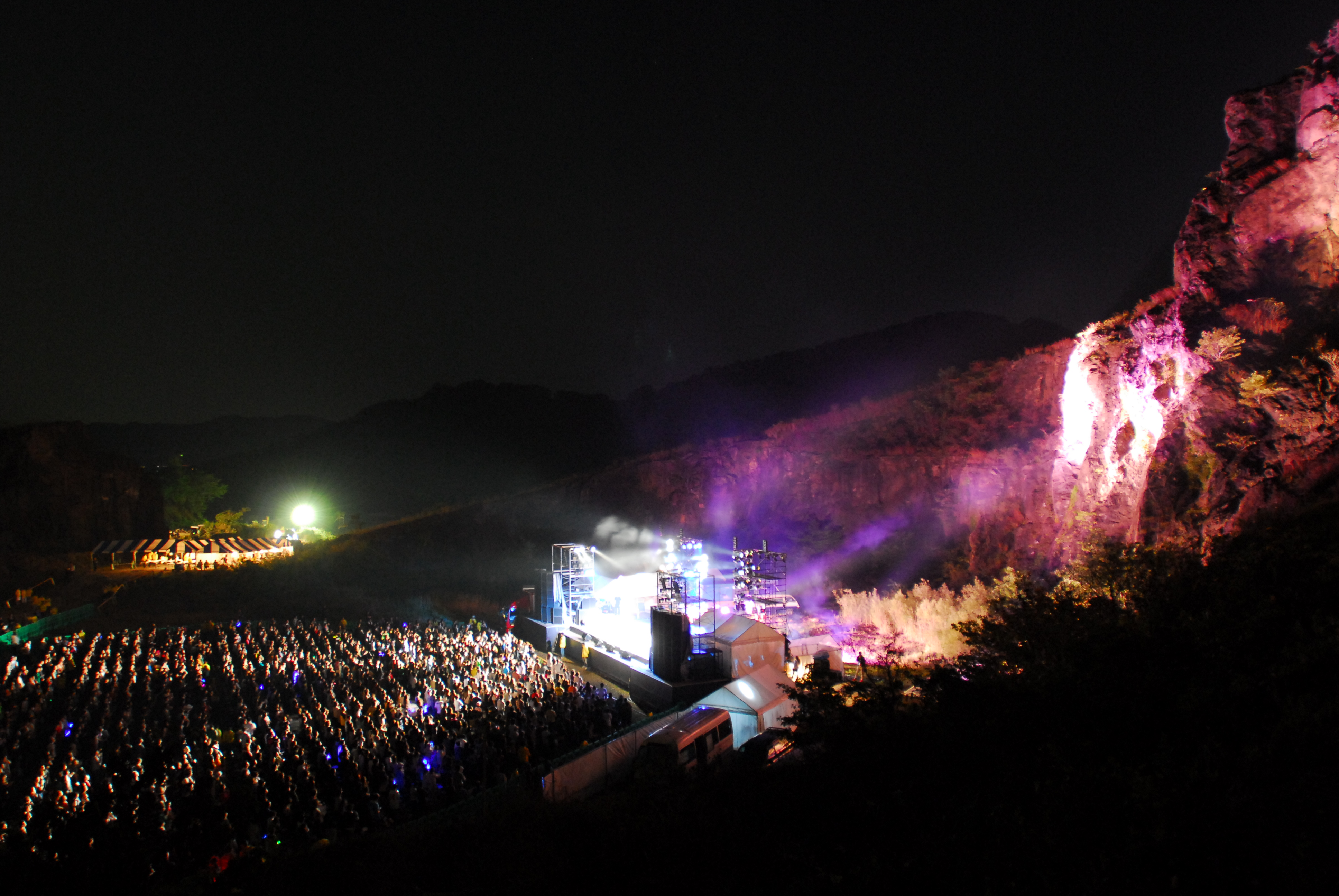 クリフステージ＃09 ステージとライトアップの状況